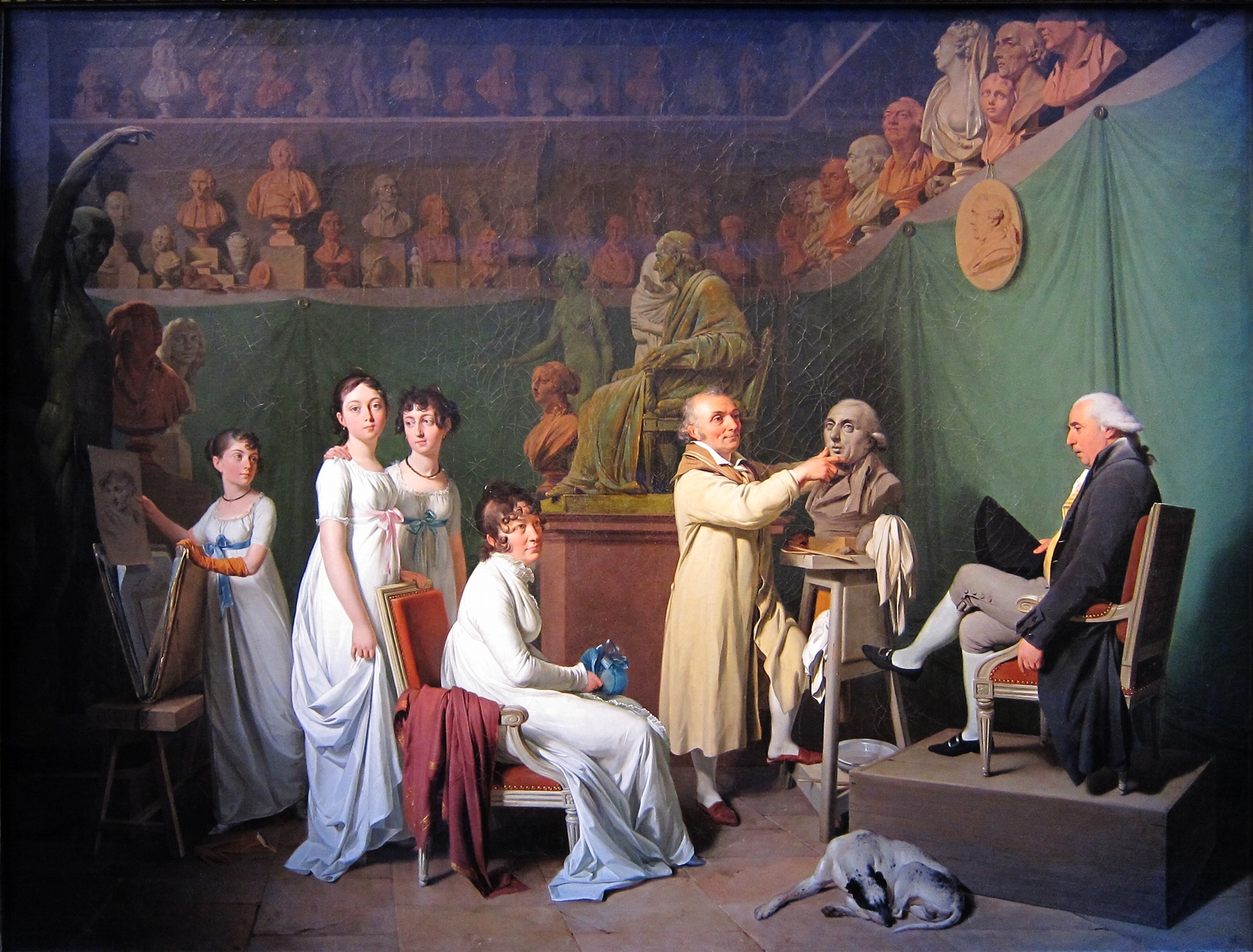 Houdon modelant le buste de Laplace dans son atelier